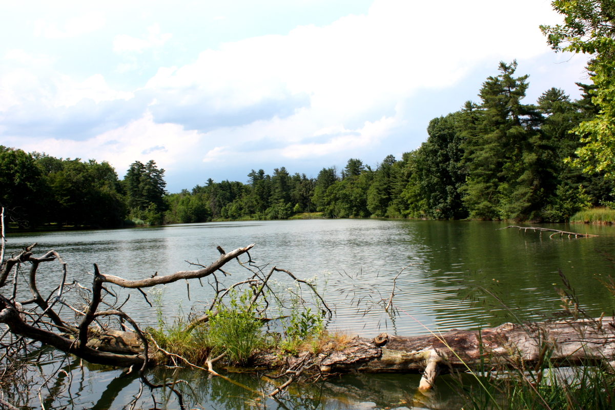 parco della Mandria